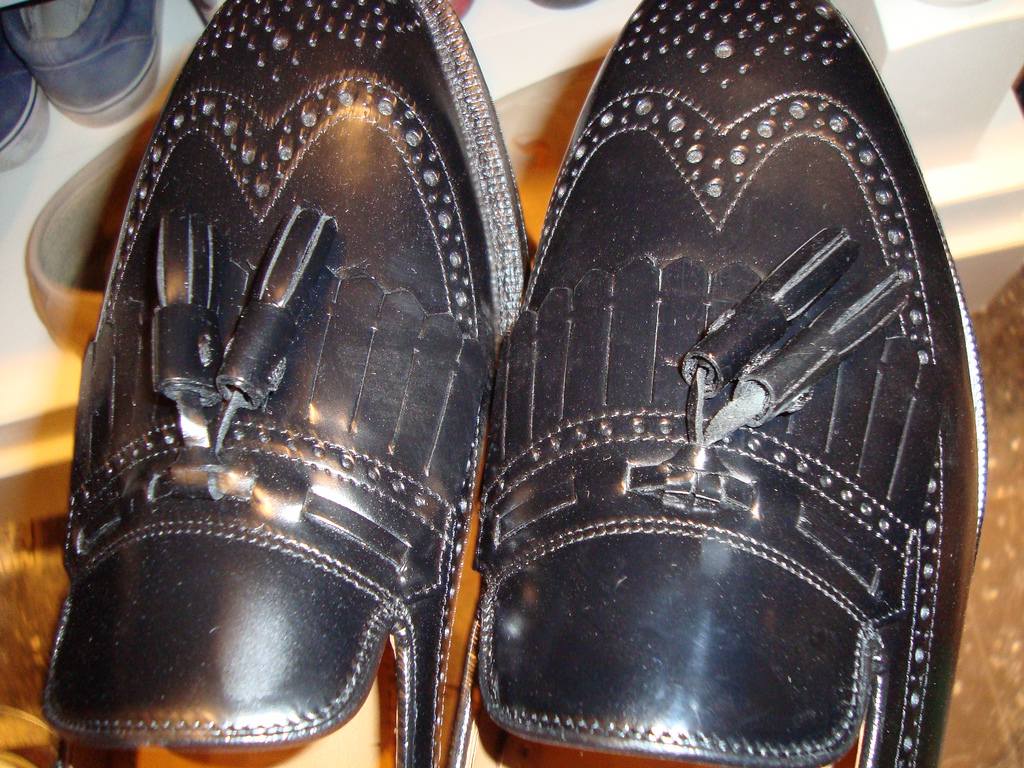 Schwarze Tasselloafer, Detail Ziersenkel